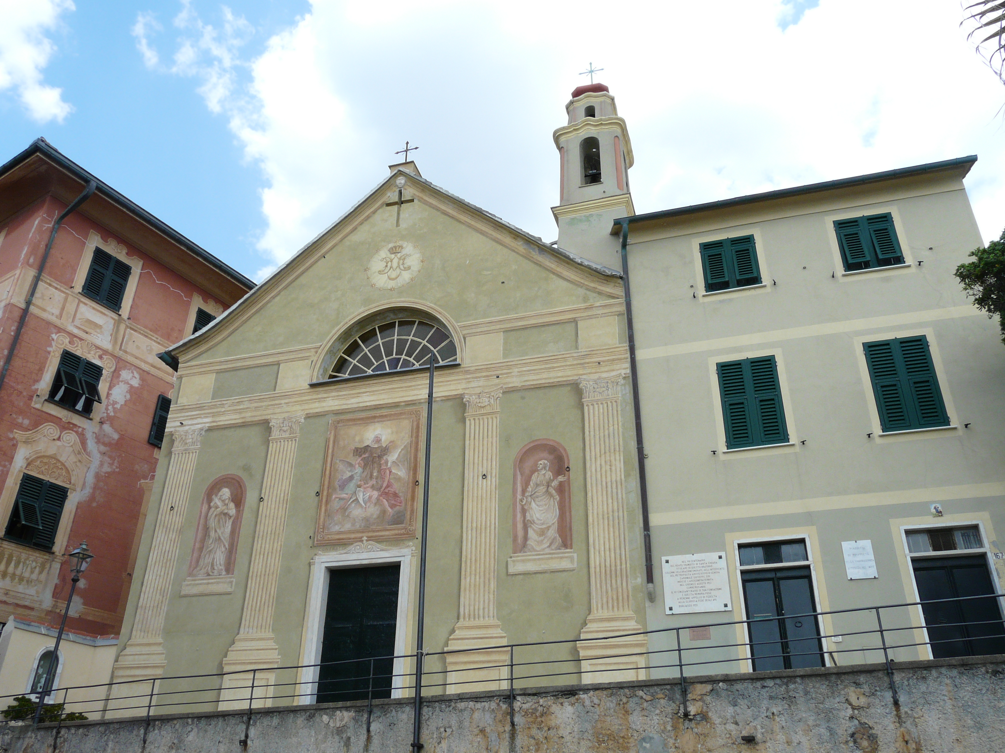 Chiesa di Santa Chiara, Bogliasco, Liguria, Italia